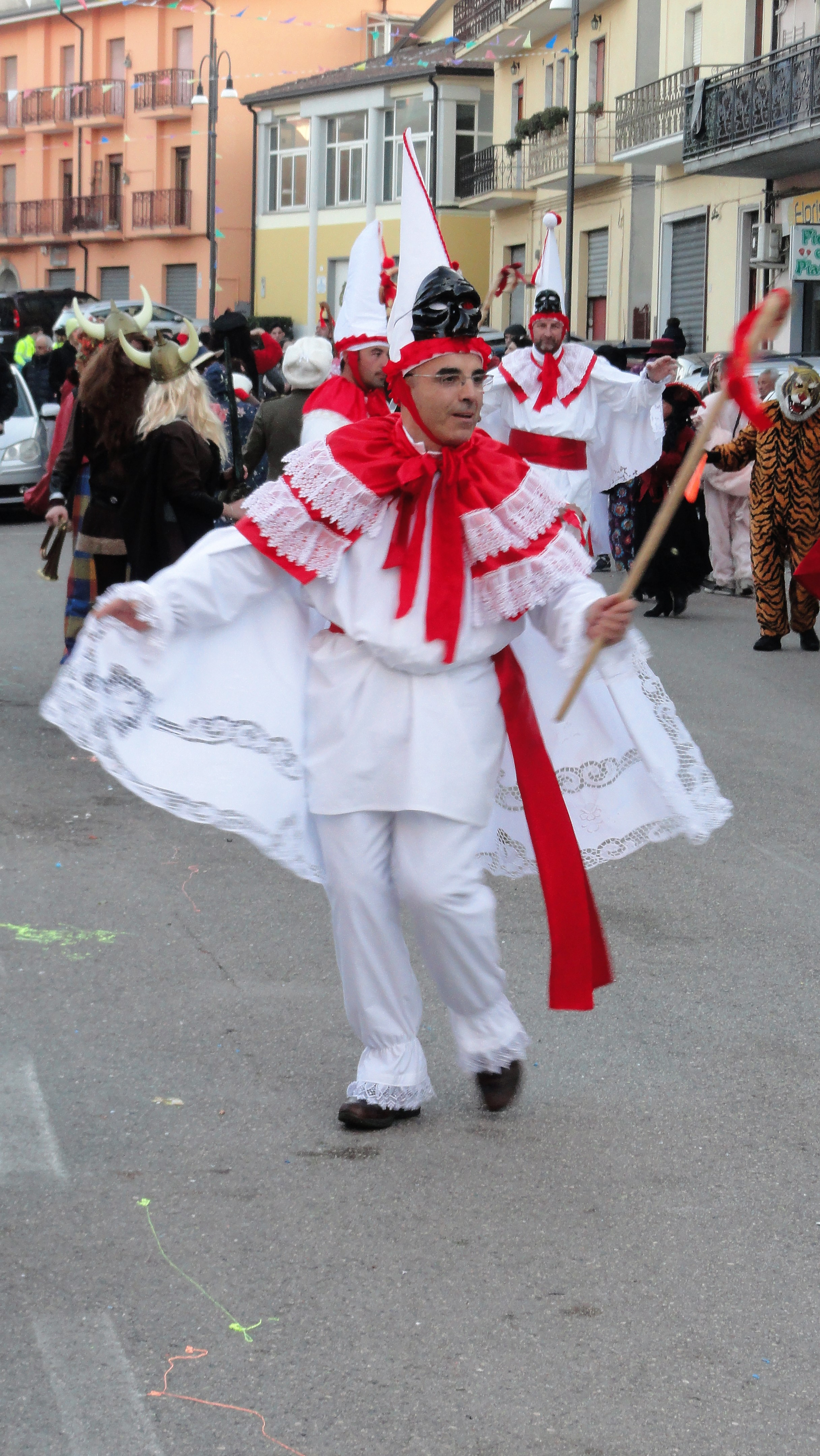 Carnevale di Montemarano 2020, i "Caporabballo". This photo has been taken in the country: Italy